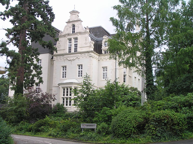 Luxemburgisches Schloss, frontside